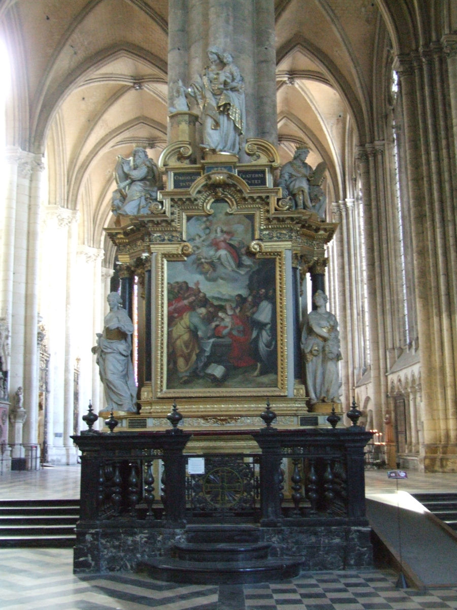 Amiens Cathedral (Cathédrale Notre-Dame d'Amiens), France. Chapelle de Notre-Dame du Pilier Rouge ou de Notre-Dame du Puy; œuvre de Nicolas Blasset, offerte en 1627 par Antoine Pingre, maître de la Confrérie du Puy. En haut: la Vierge tirant un enfant d'un puits, entre David et Salomon. En bas, de gauche à droite: Sainte Geneviève, par Cressent (qui remplace l'Esther de N. Blasset, détruite à la Révolution), l'Assomption de la Vierge par François Francken le Jeune (1628), Judith tenant la tête d'Holopherne.